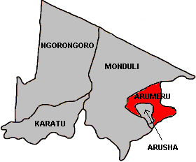 District d'Arumeru en Tanzanie